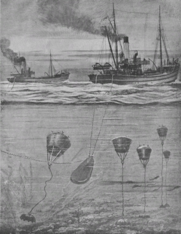 Английские траулеры вылавливают немецкие мины в Северном море, 1914 год.